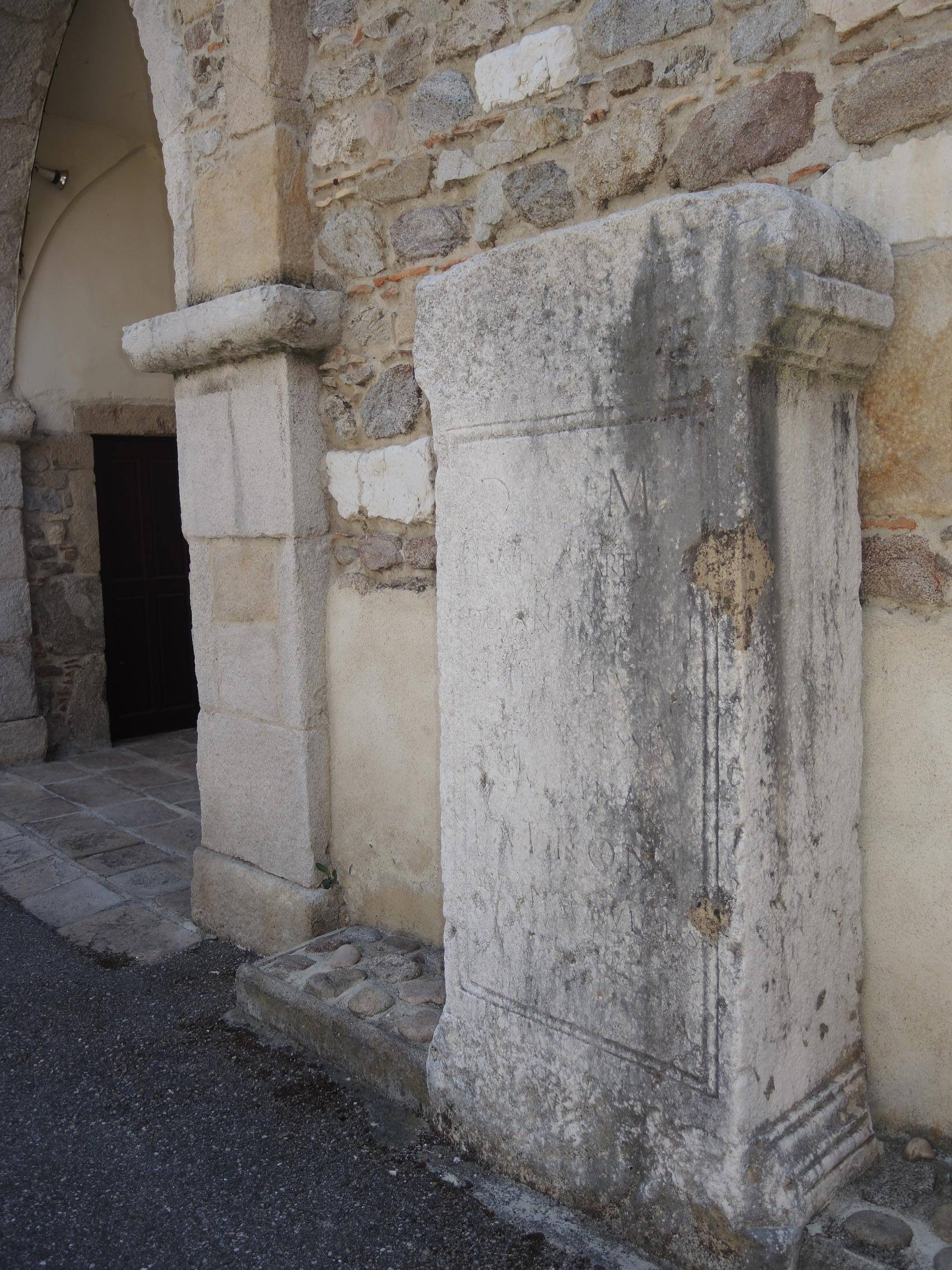 Limony détail